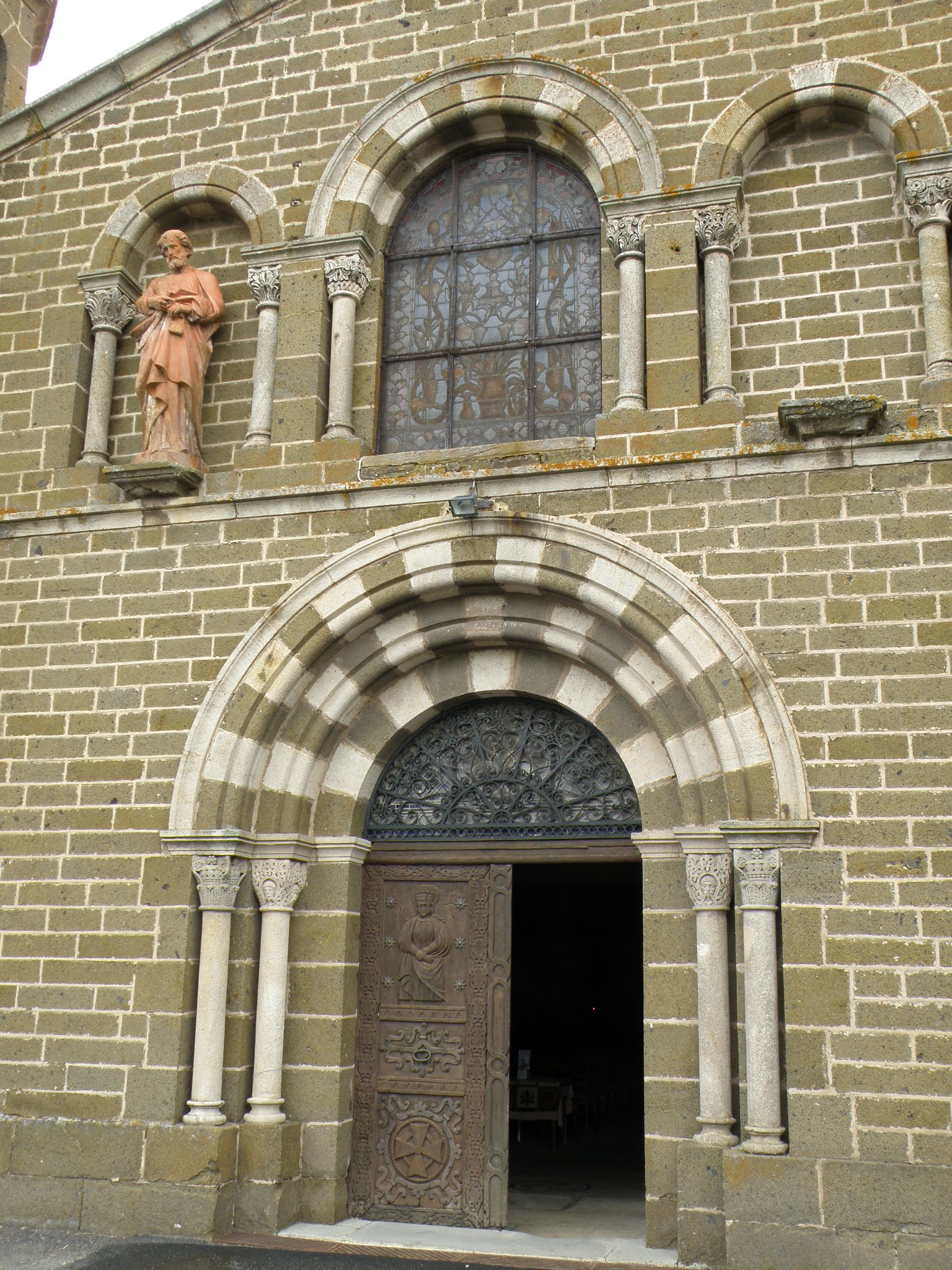 Solignac-sur-Loire, comm. de la Haute-Loire, France (région Auvergne). Église Saint-Vincent, façade occidentale.